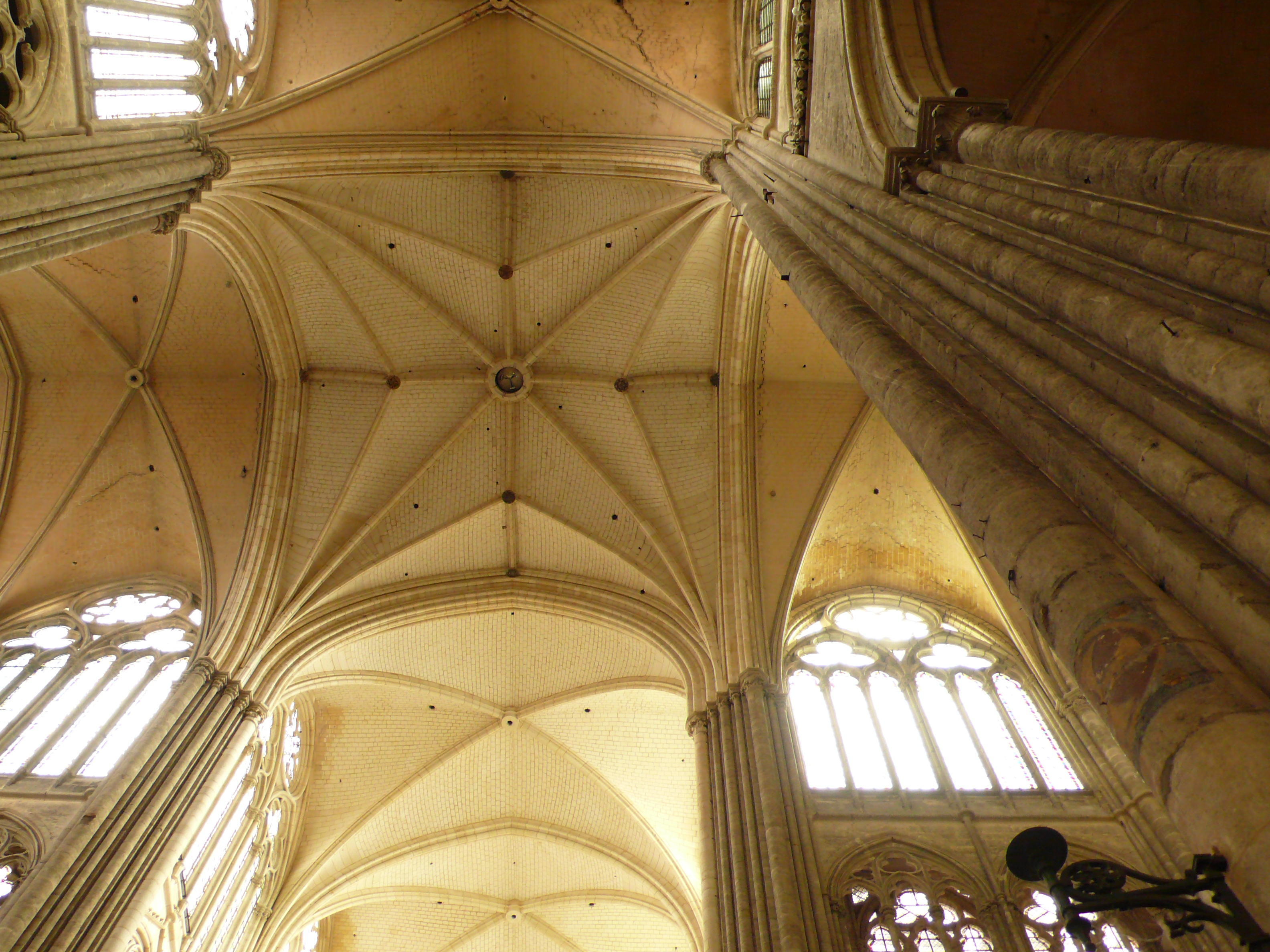 Kathedrale von Amiens, Frankreich; Vierungsgewölbe